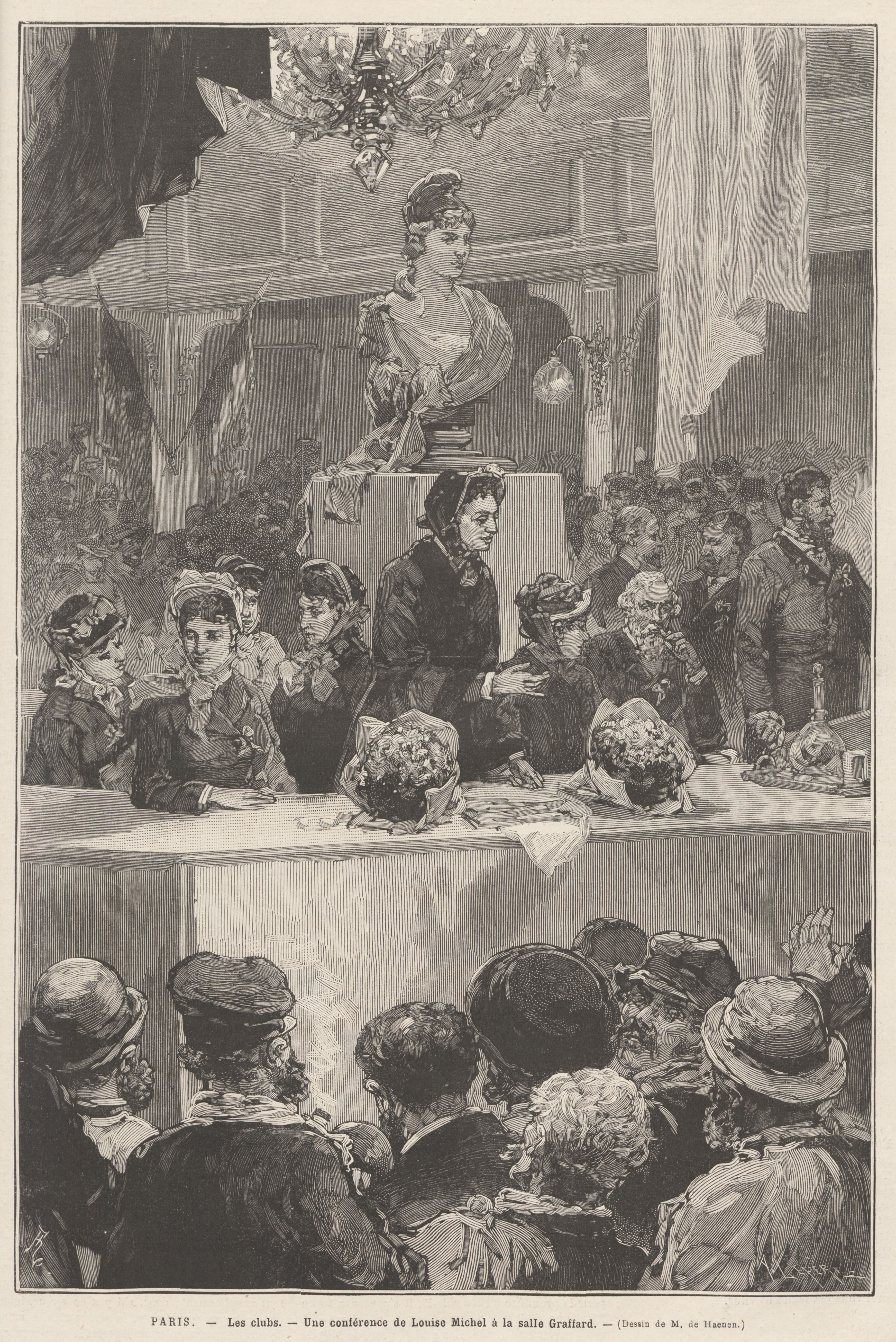 Paris.—Les clubs.—Une conférence de Louise Michel à la salle Graffard.— (Dessin de M. de Haenen.)